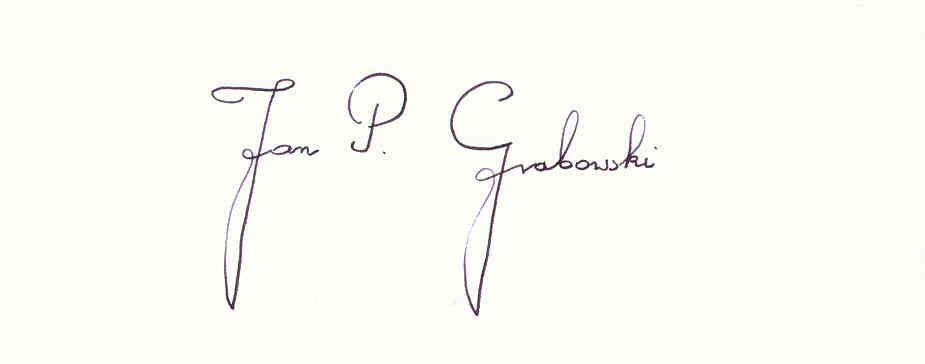 Jan P. Grabowski (pomorski poeta i prozaik), autograf.